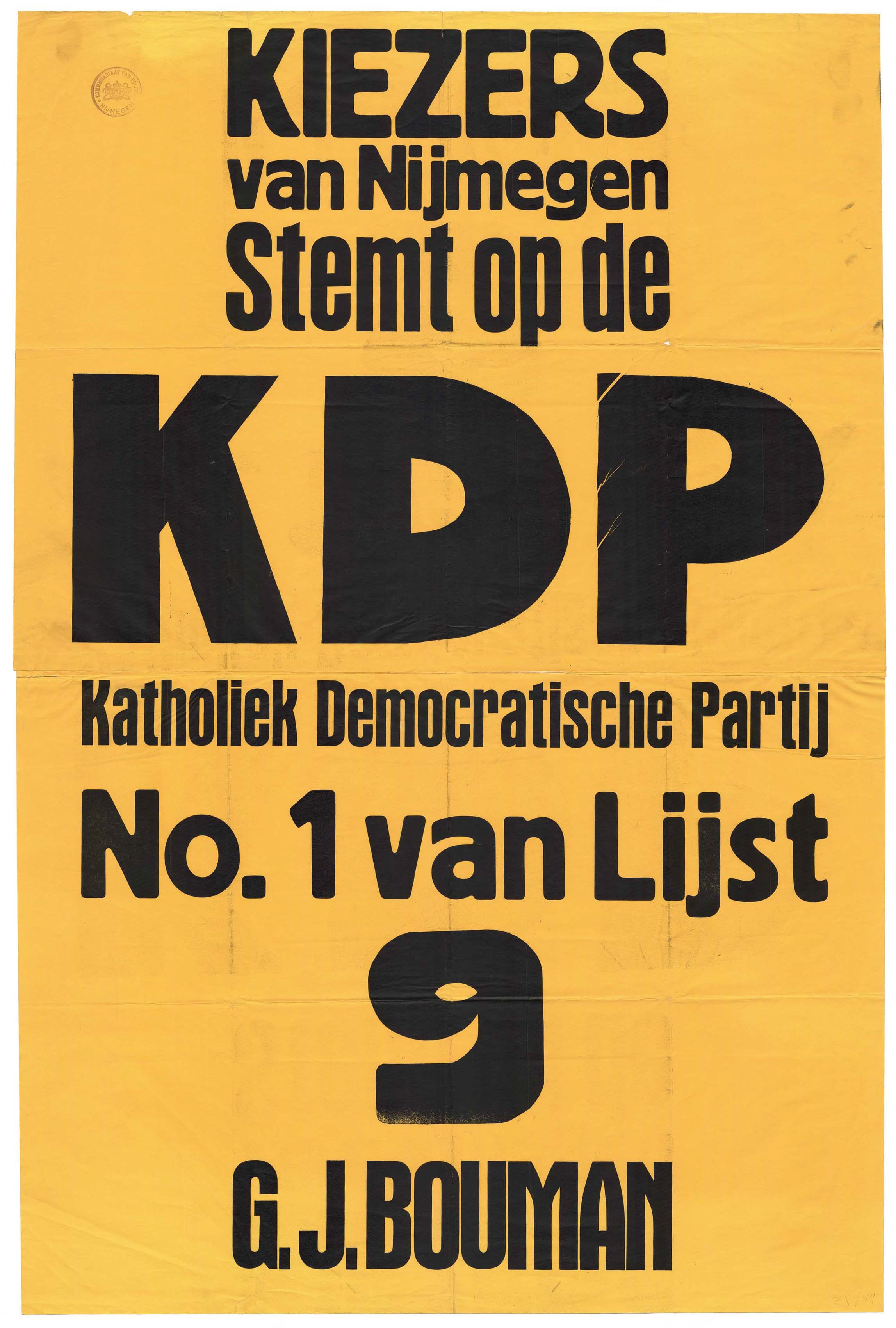 Kiezers van Nijmegen. Stemt op de KDP Beschrijving Oproep voor de gemeenteraadsverkiezingen van de Katholiek Democratische Partij en G.J.Bouman. Op de voorzijde een stempel van het Commissariaat van Politie te Nijmegen van 17 juni 1935.